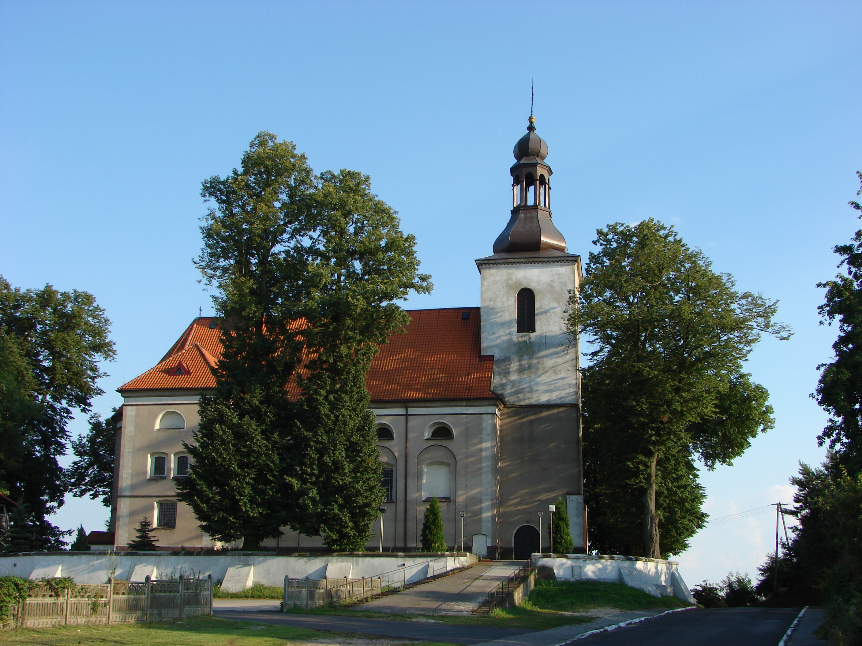 Goszczanów, kościół św. Marcina, 1660